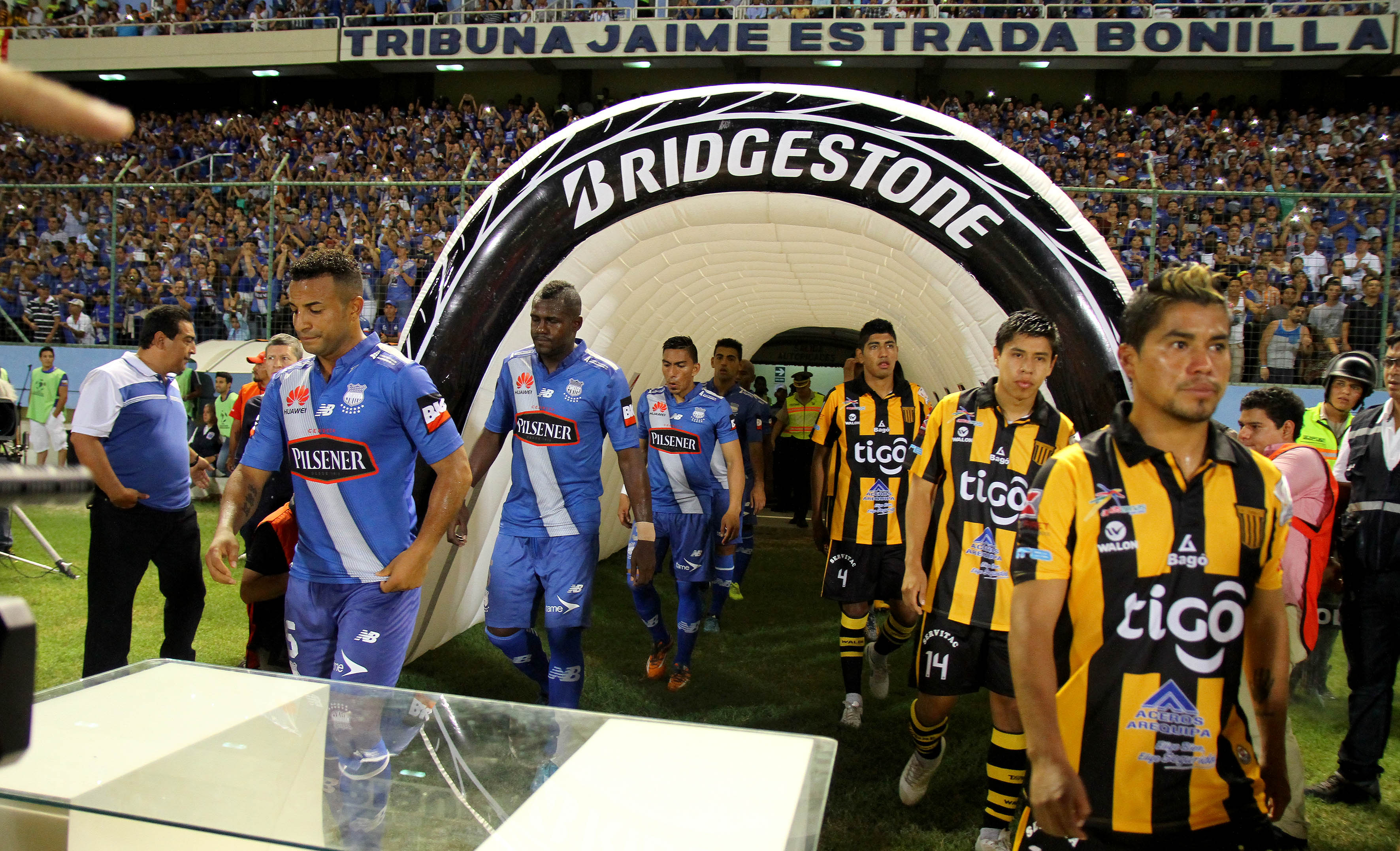 Manta, martes 24 de febrero del 2015 (ANDES).-Emelec enfrenta al The Strongest de Bolívia en el estadio Jocay de la ciudad de Manta, Manabí, partido por Copa Libertadores Foto:César Muñoz/ANDES